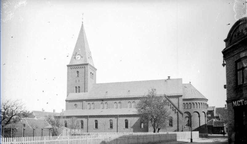 Billede af Vor Frue Kirke i Aalborg. Taget fra Niels Ebbesens Gade af H. Tønnies.